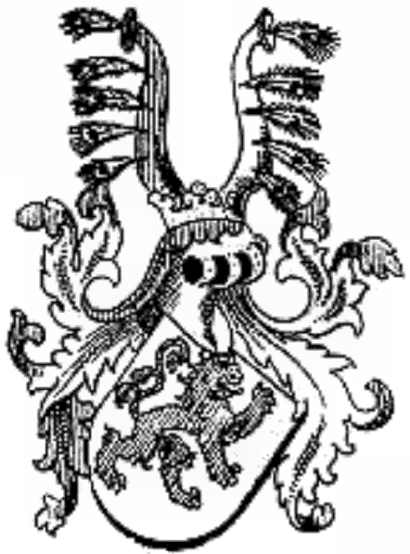 Aham v. Neuhaus, Stammwappen nach 1383